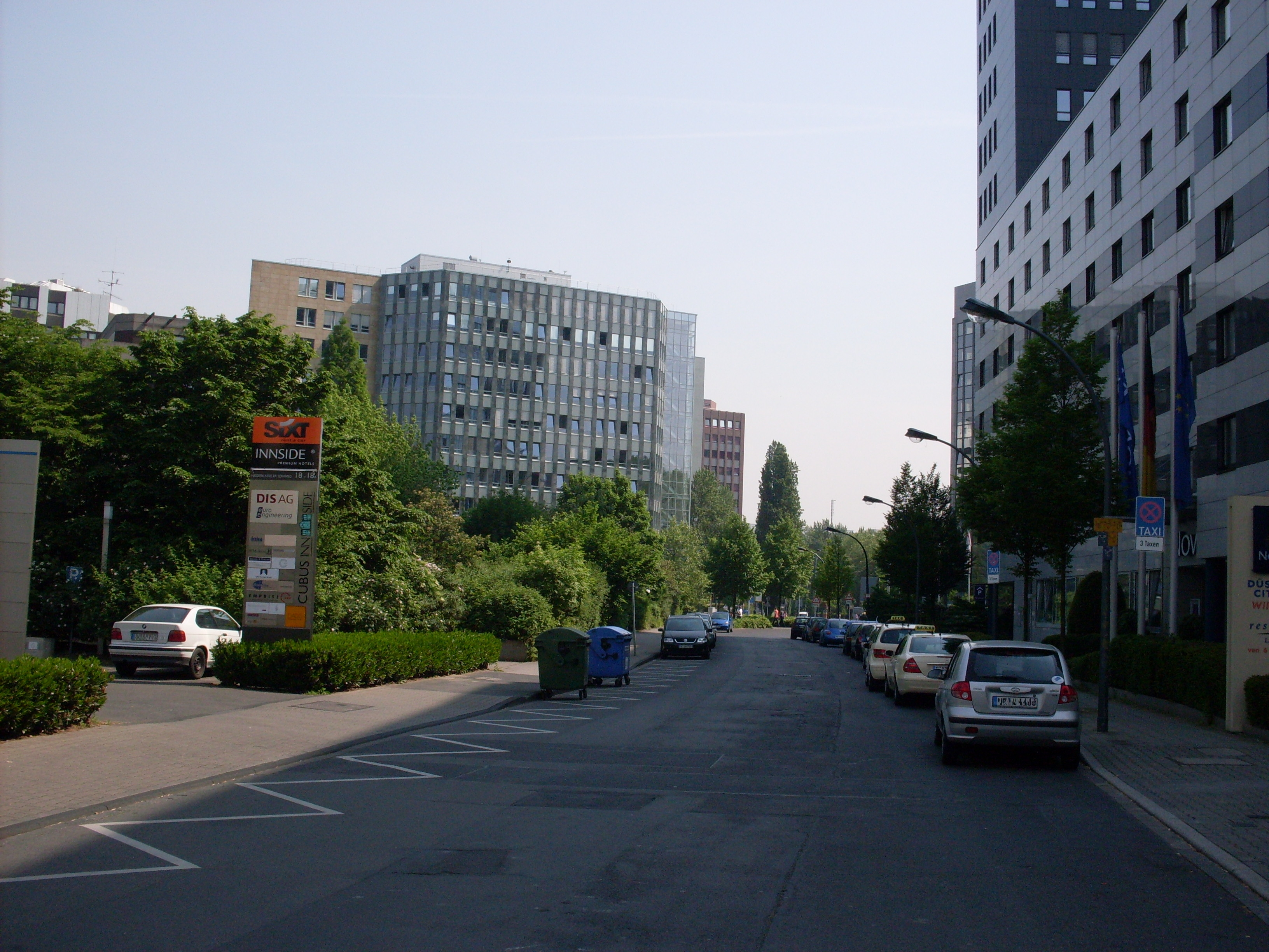 Düsseldorf-Lörick, Bürogebiet Seestern